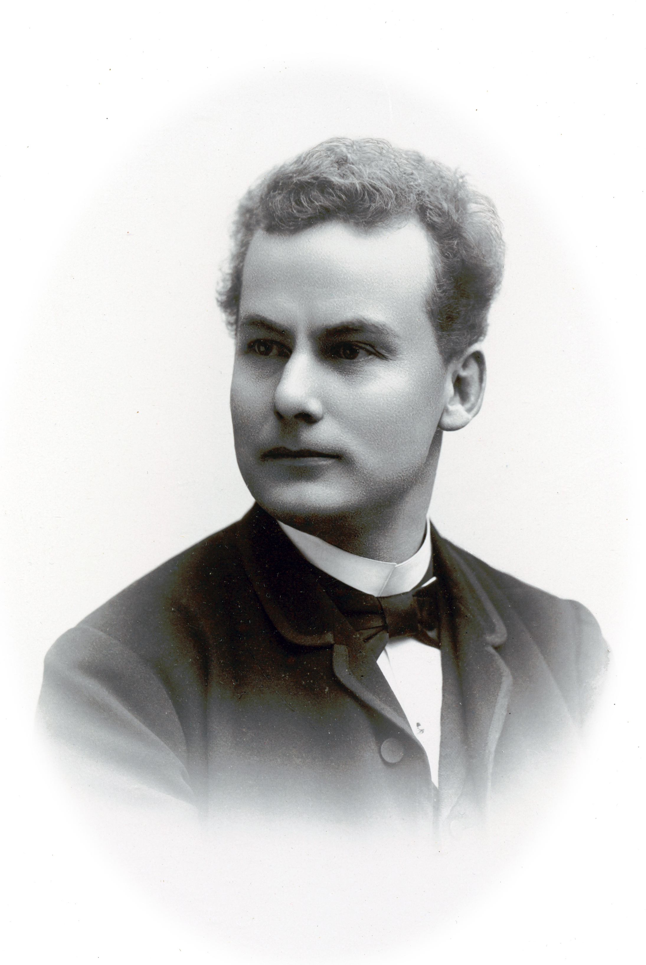 Justus Hagman, skådespelare vid Vasateatern 1892